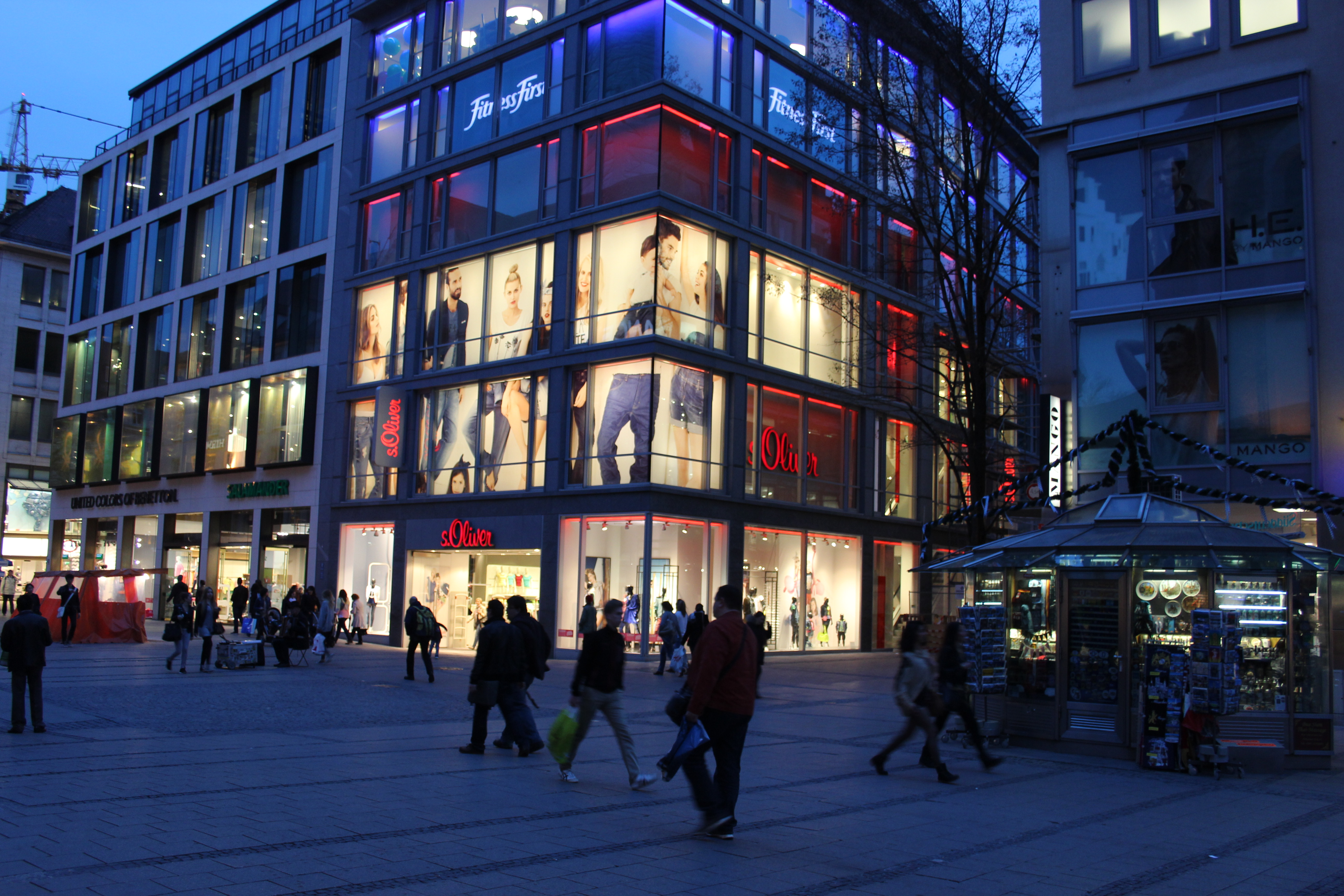 s.Oliver Shop in München in der Kaufingerstraße